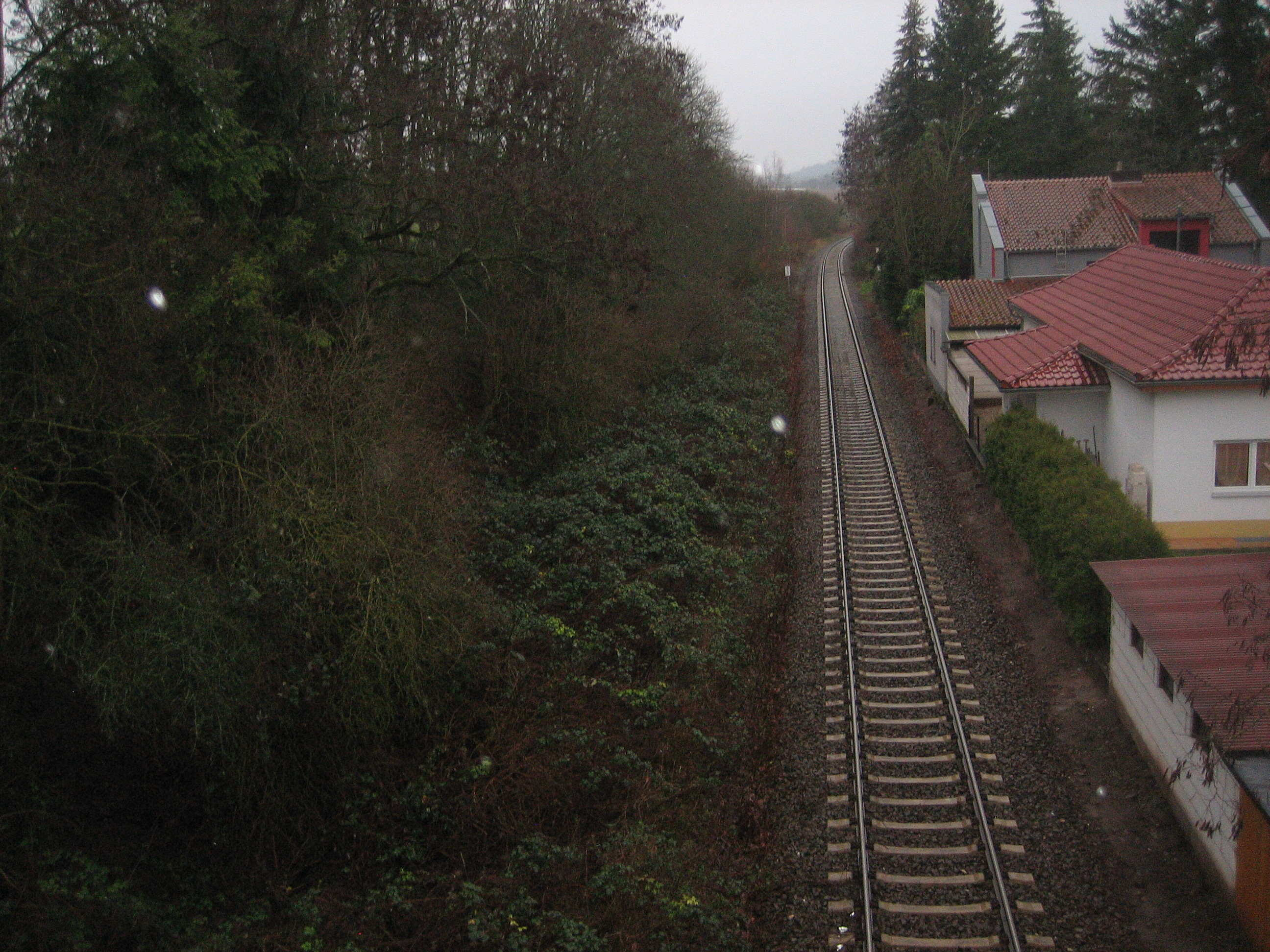 Bereich des früheren Bahnhof Ebertsheim Haltepunkt